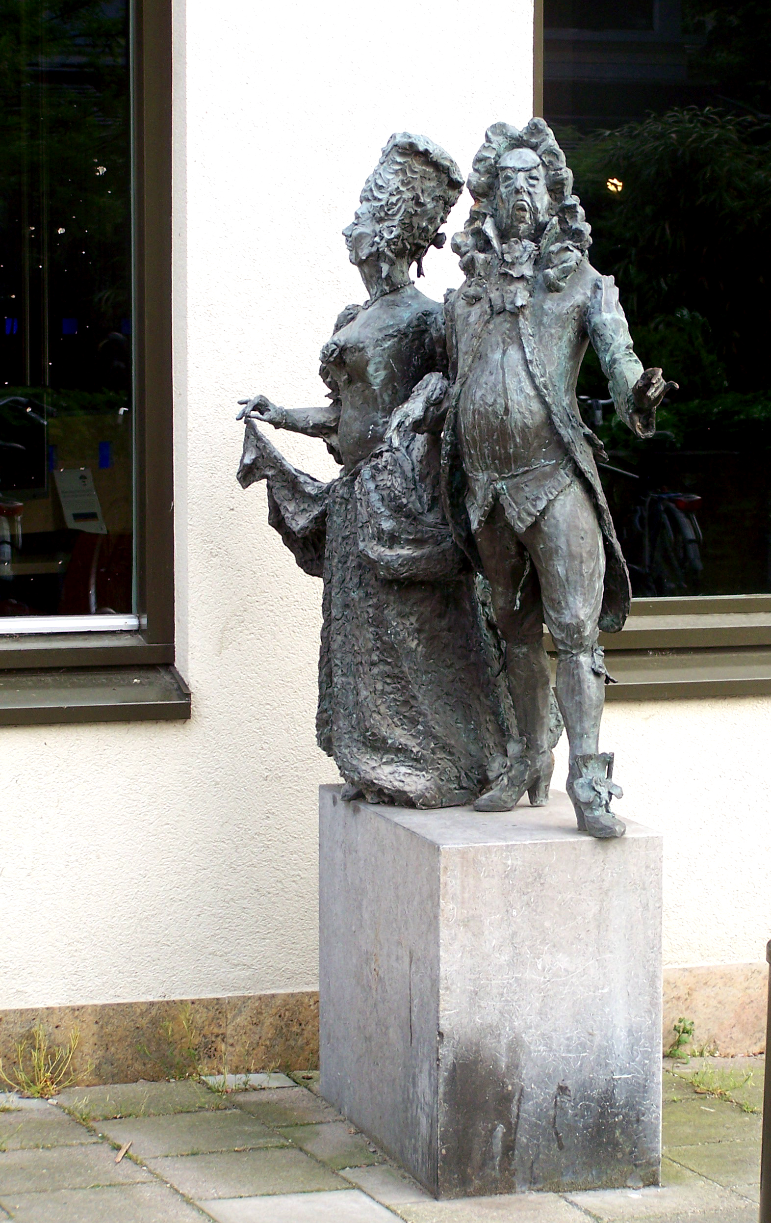 Sculpture "De glorie van de Vechtstreek" (The Glory of the Vechtregion) (1989) by Willem Gerrit van der Hulst jr. Placed at the Dudok de Witstraat in Breukelen.